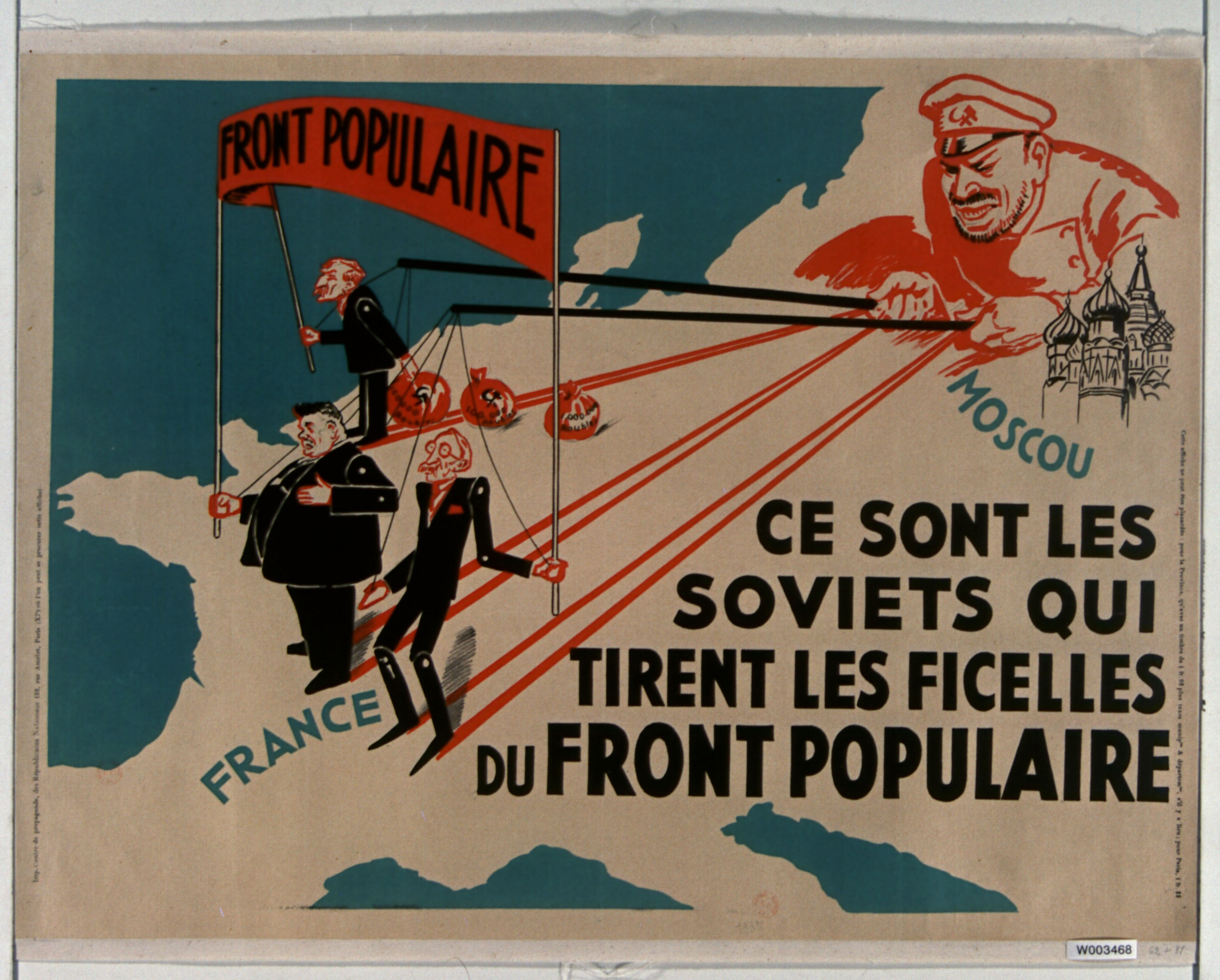 Affiche éditée par le Centre de propagande des républicains nationaux à l'occasion des élections de 1936.